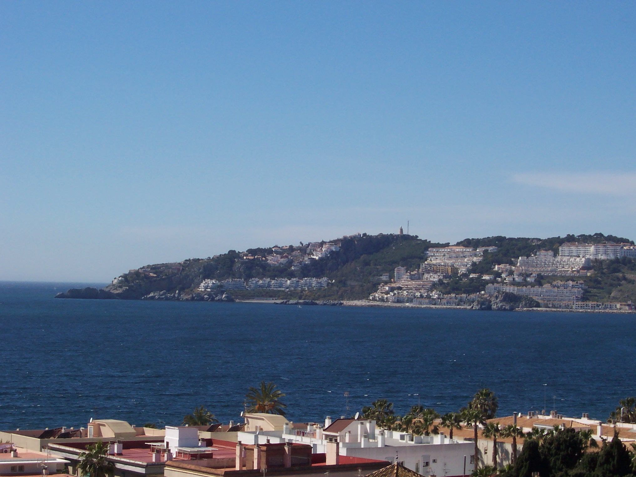 Marina del Este desde el castillo de Almuñécar (Granada, España)